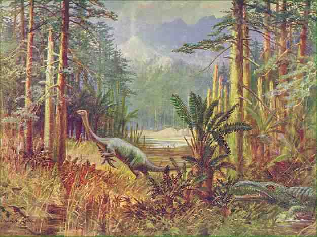 Anchisaurus.